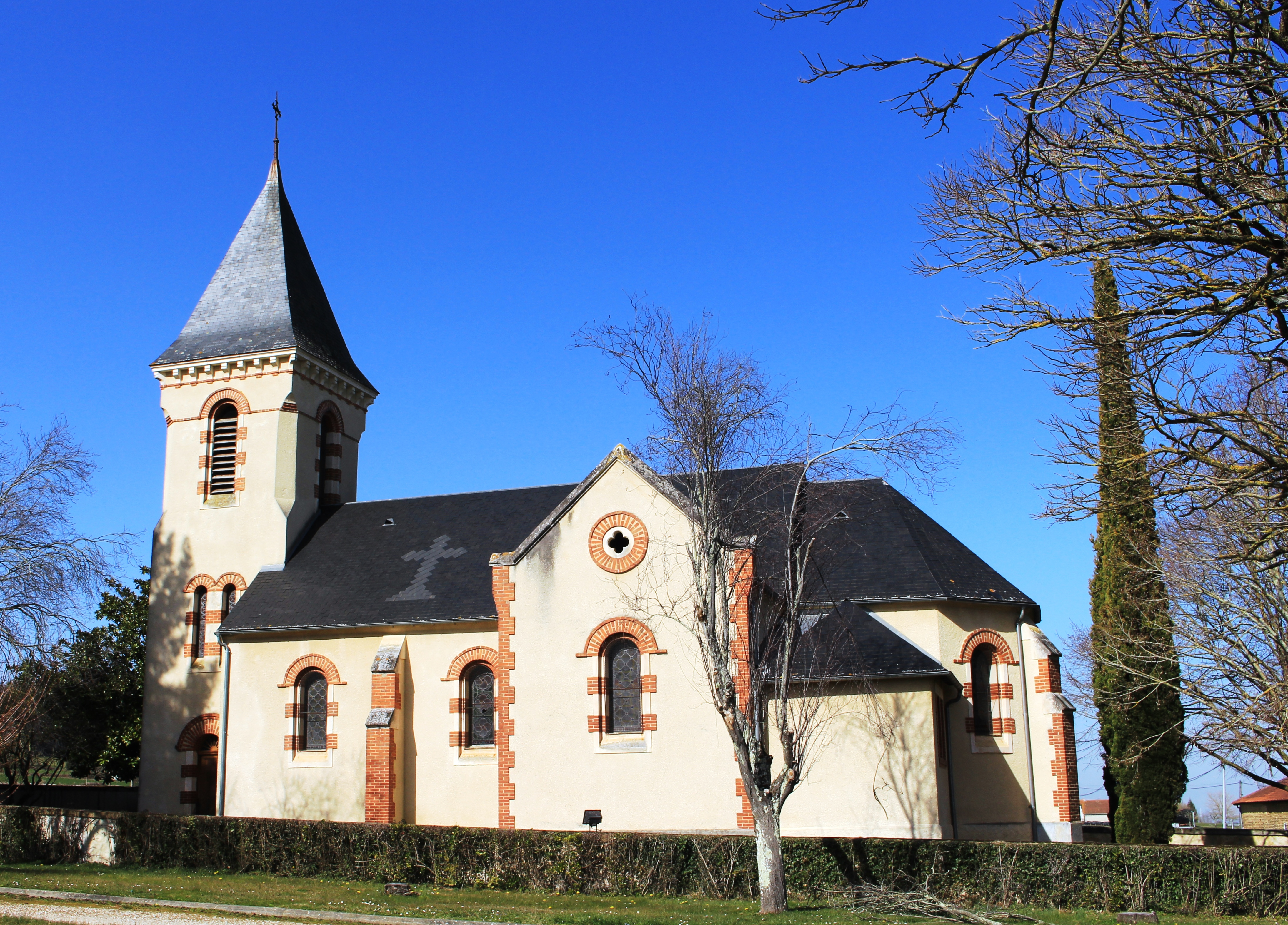 Église Saint-Luc de Lubret-Saint-Luc (Hautes-Pyrénées)